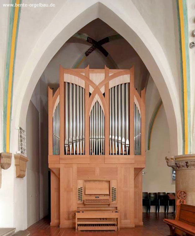 Die Bente-Orgel der Ev.-luth. Margarethenkirche in Gehrden